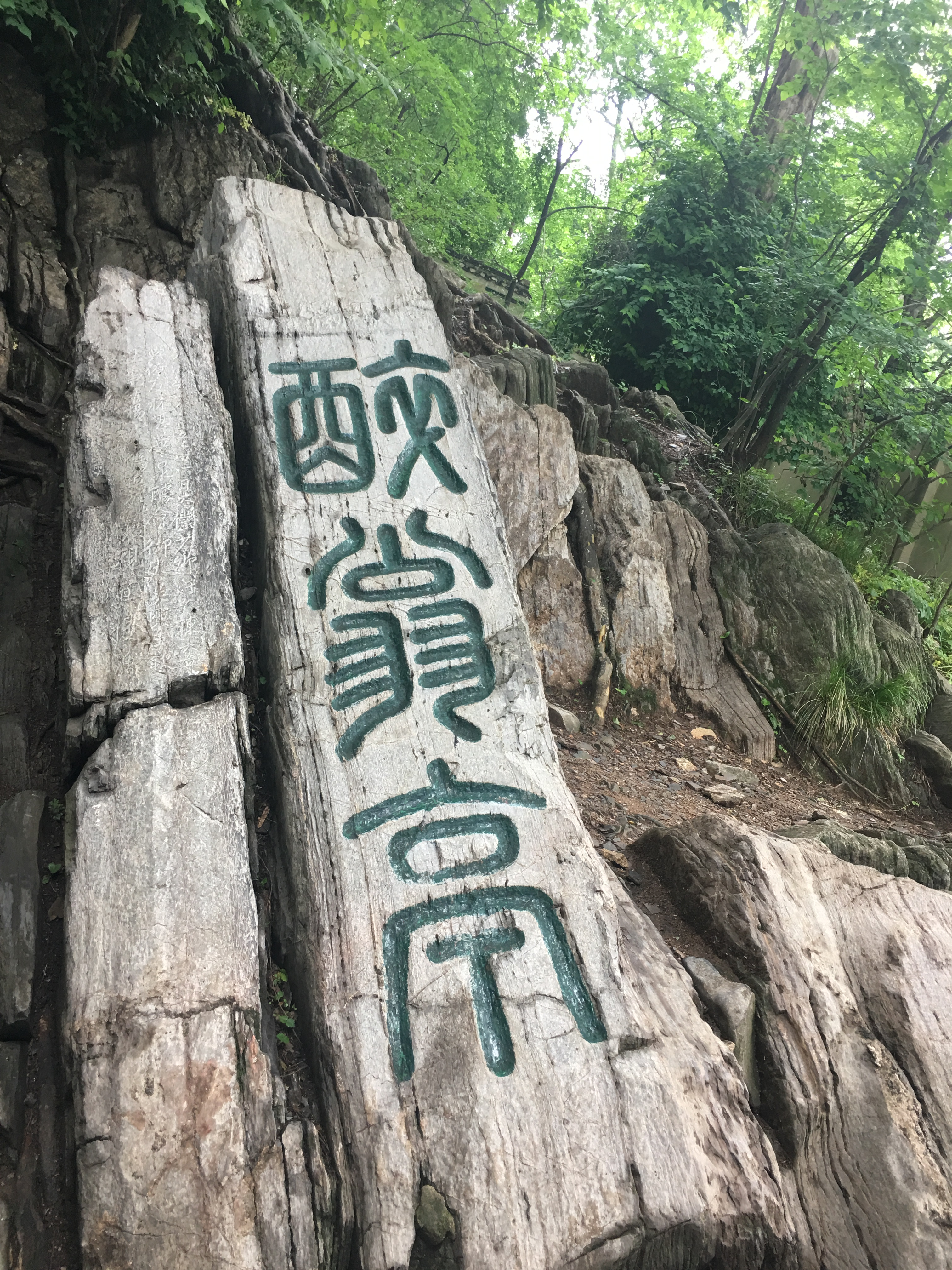 中文（中国大陆）: 我母亲代拍的琅琊山摩崖石刻